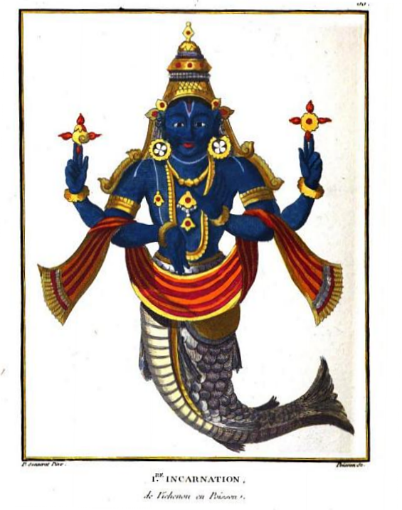 Première incarnation de Vichnou en poisson (Sonnerat)